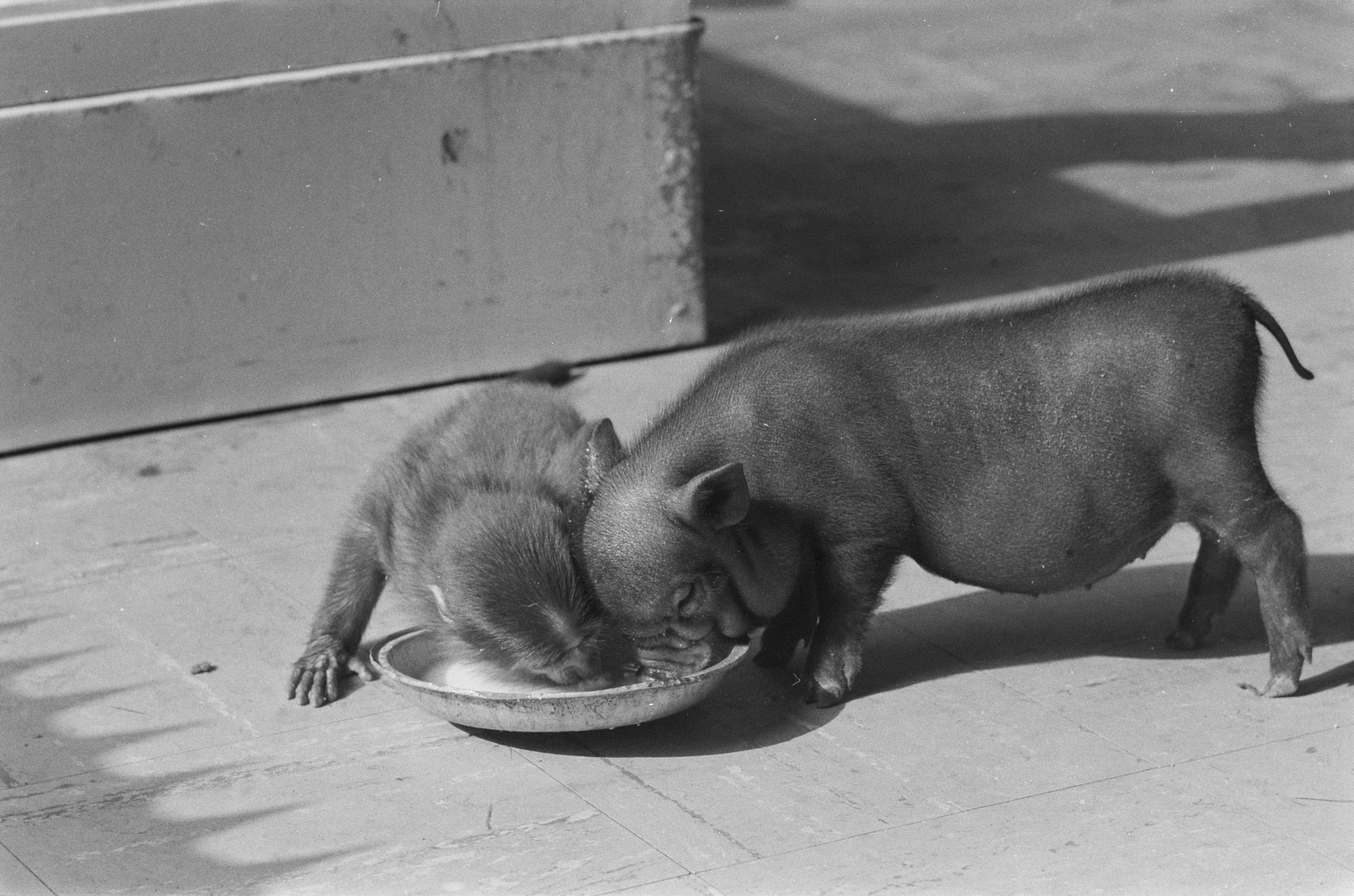 Collectie / Archief : Fotocollectie Anefo Reportage / Serie : [ onbekend ] Beschrijving : Schilders in Artis in een kooi aan het schilderen, hangbuikzwijntje met aapje Datum : 28 maart 1960 Instellingsnaam : Artis Fotograaf : Pot, Harry / Anefo Auteursrechthebbende : Nationaal Archief Materiaalsoort : Negatief (zwart/wit) Nummer archiefinventaris : bekijk toegang 2.24.01.05 Bestanddeelnummer : 911-1277